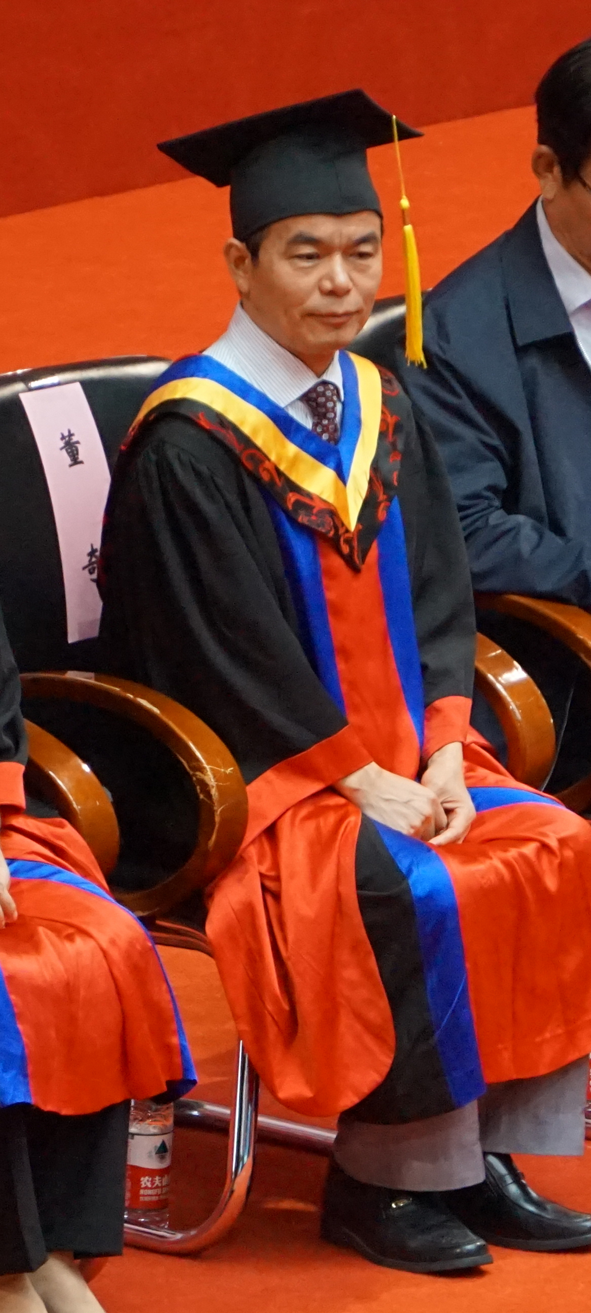 北京师范大学校长董奇于2017年北师大研究生毕业典礼上。